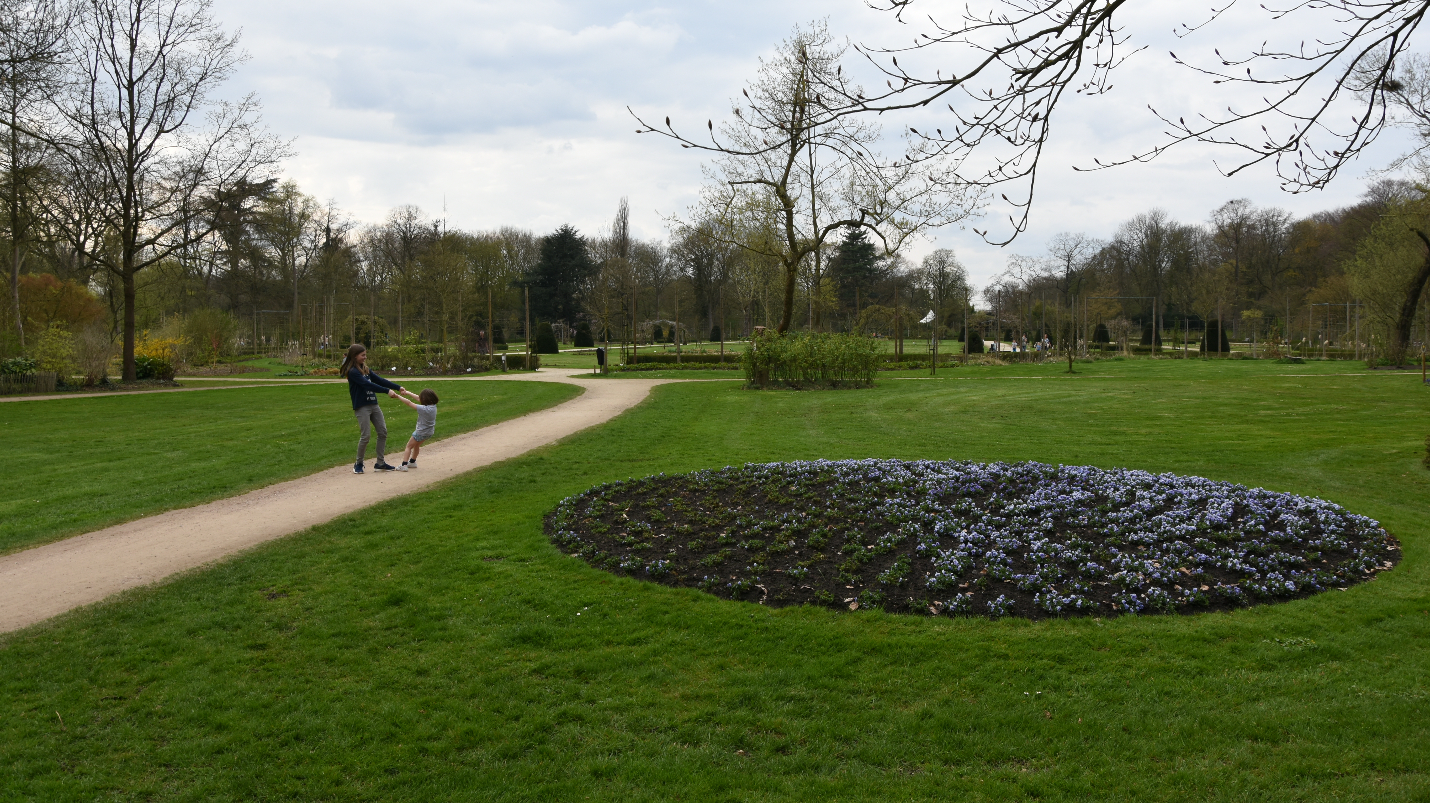 Het Vrijbroekpark te Mechelen, België